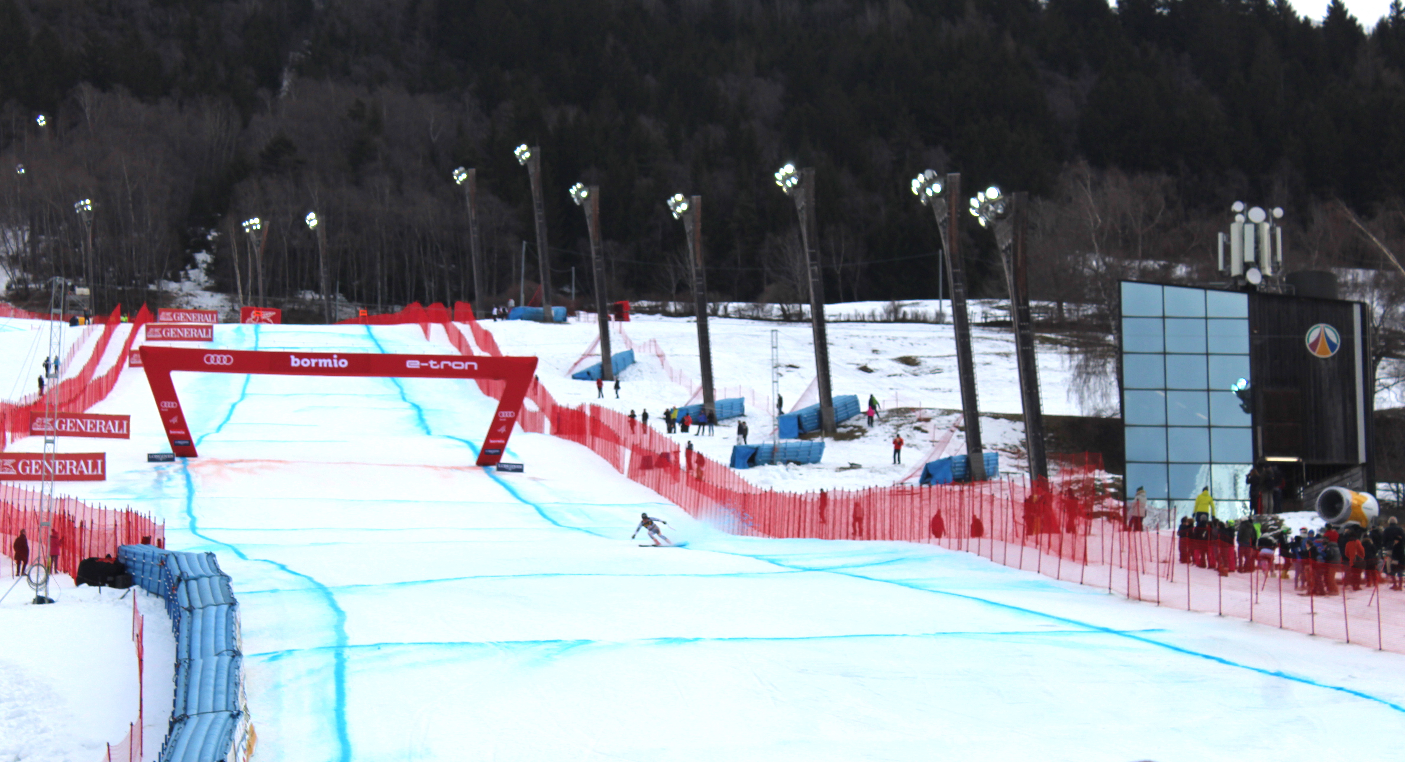 Lo sciatore alpino norvegese Adrian Smiseth Sejersted al traguardo della Pista Stelvio di Bormio, durante la discesa libera del 27 dicembre 2019, valida per la Coppa del Mondo di sci 2019-2020.